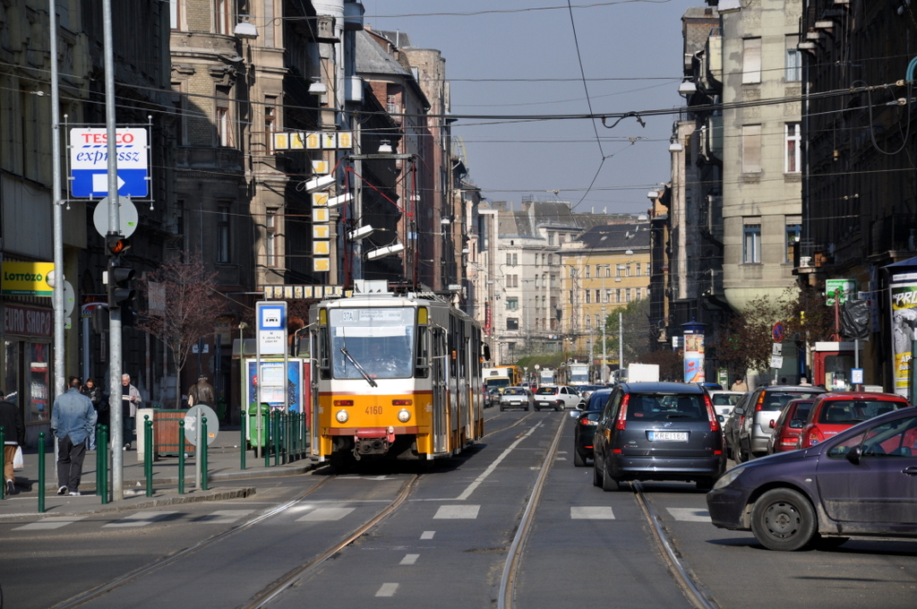 Népszínház Street, Budapest (Tram 37A at "II. János Pál pápa tér" stop)